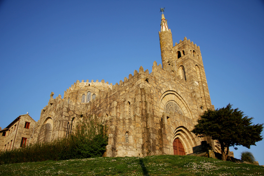 Una de las grandes obras de Antonio Palacios en Galicia es el Templo Votivo Mar en Panxón, proyectado entre 1932 y 1937. Actualmente este hermoso edificio se encuentra muy deteriorado por el modo y los materiales con los que se edificó el templo, que se levantó gracias a las aportaciones de los vecinos, que contribuyeron a su construcción incluso con materiales reciclados. El templo se halla cargado de referencias historicistas. Los pazos barrocos, la catedral de Tui, o las ruinas de un arco visigodo (siglo VII) que se encuentra en su mismo entorno, servirán de elementos inspiradores para Antonio Palacios. Uno de sus mejores tesoros es el tratamiento de la luz a través de las vidrieras industriales montadas en hormigón.